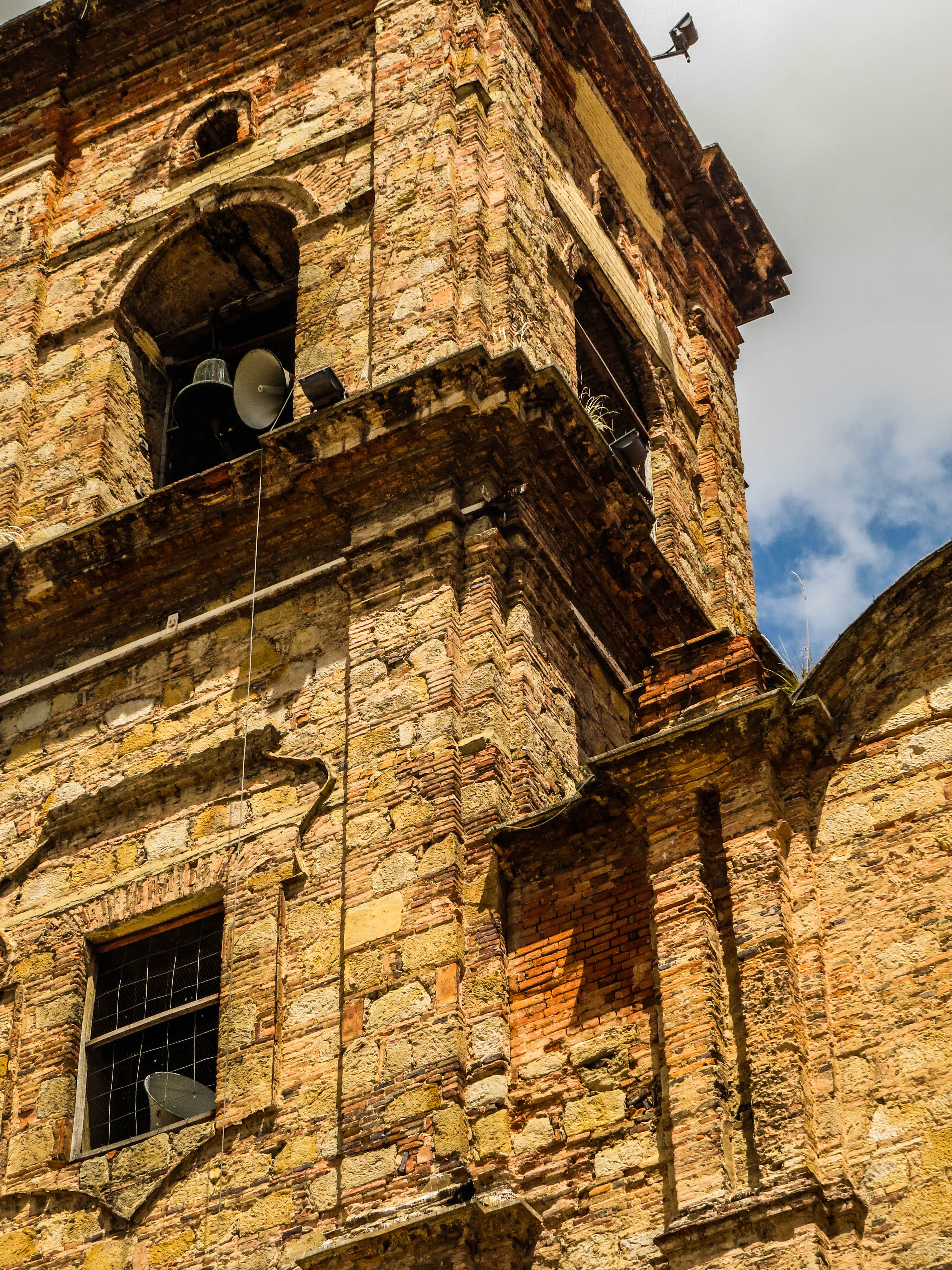 Ubicada en la plaza principal de la ciudad.